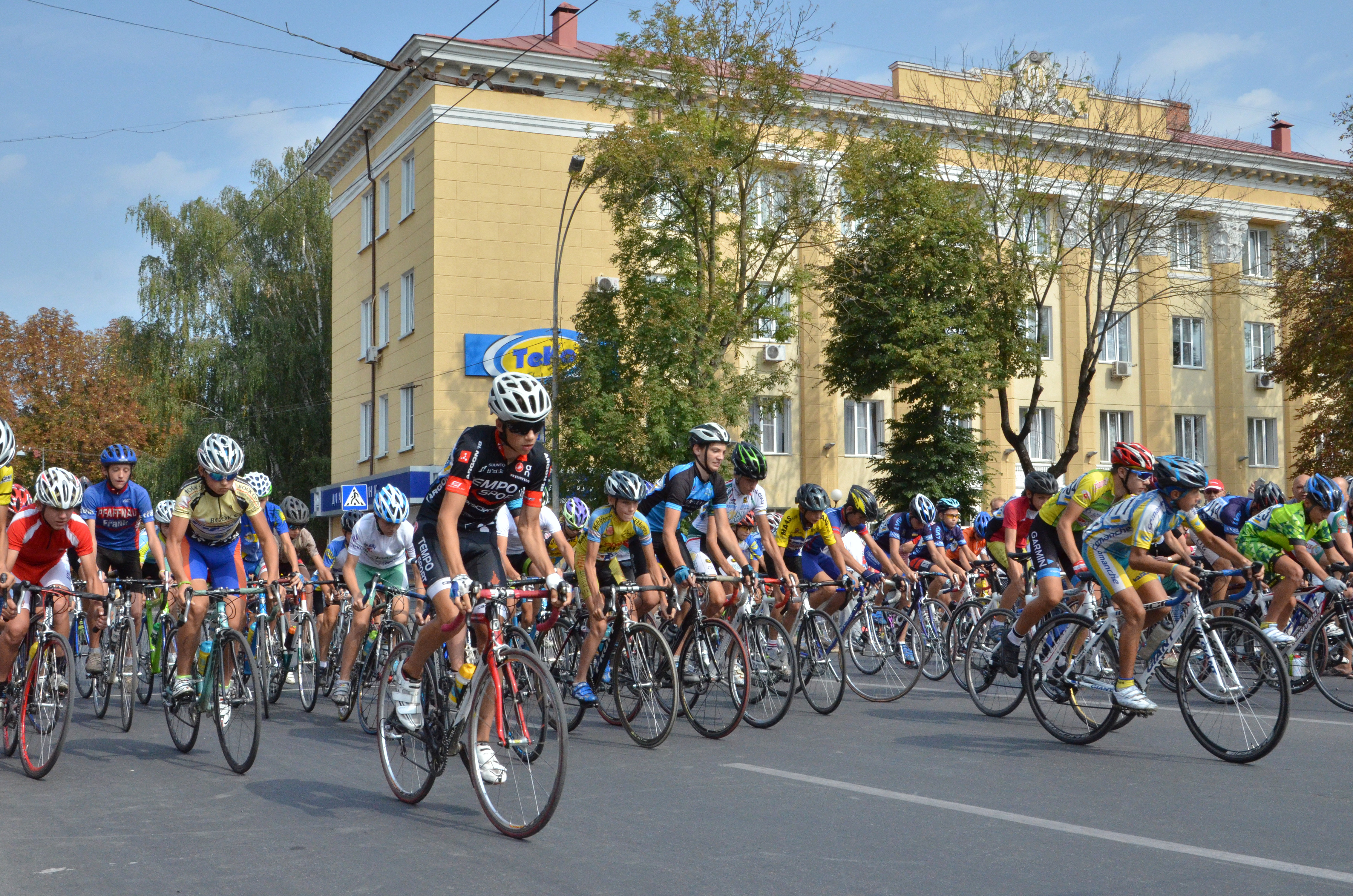 Всеукраїнські велосипедні перегони пам'яті майстра спорту Володимира Філіпенка. Старт. На тлі — Житловий будинок XIX ст. на майдан Волі, 4.